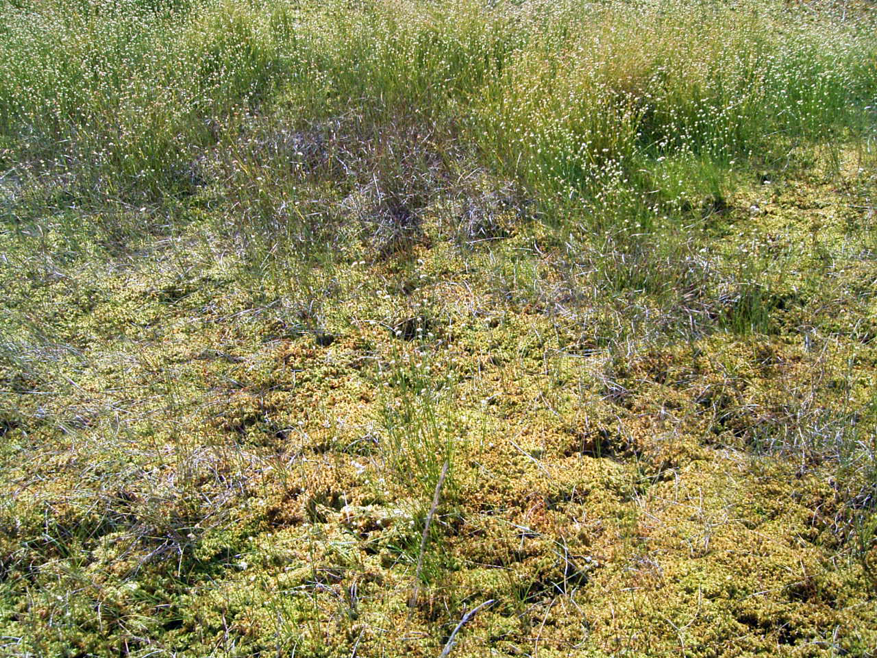 Schwingrasen, Torfmoos-Schlammseggenried auf verlandetem Moorkolk, Norddeutschland